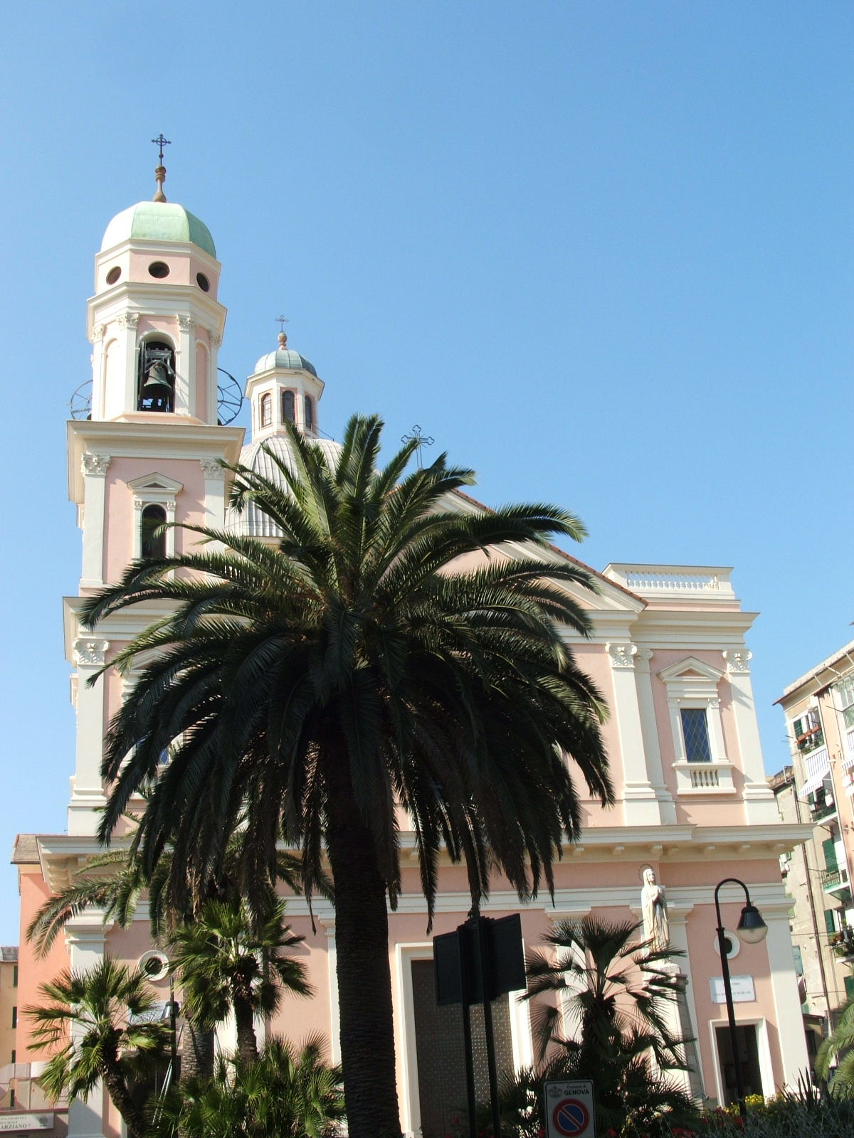 Immagine dal Genova-Pegli, Italia.